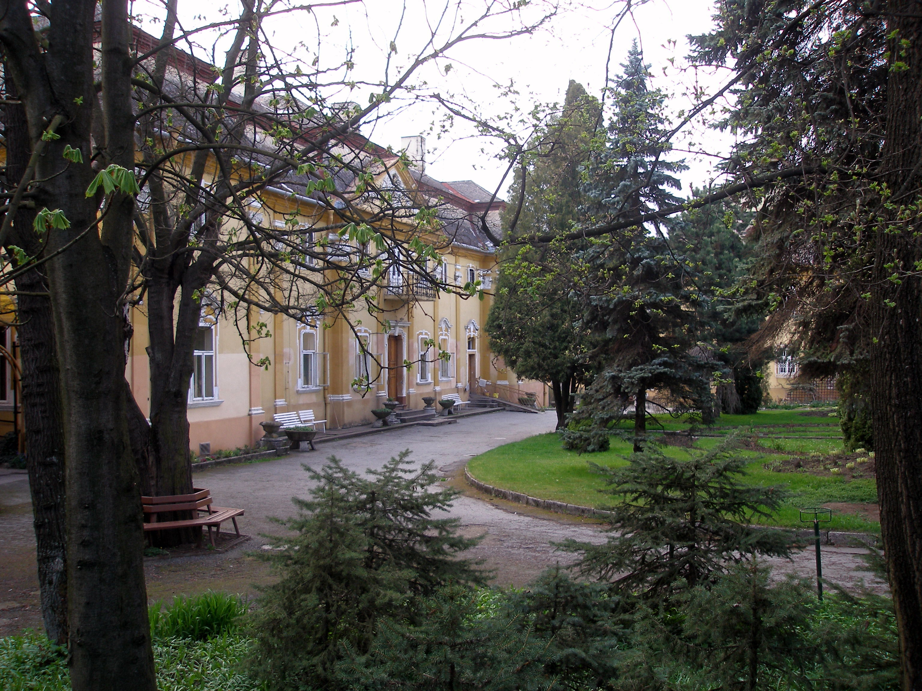 Obec Petrovany okres Prešov región Šariš